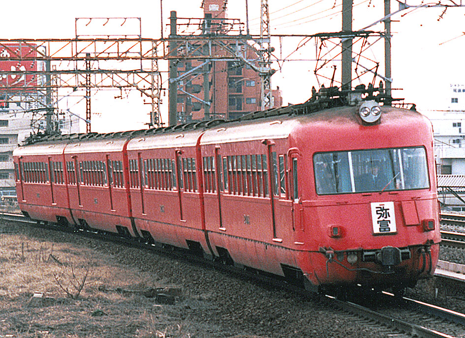 名古屋鉄道 3400系 いもむし